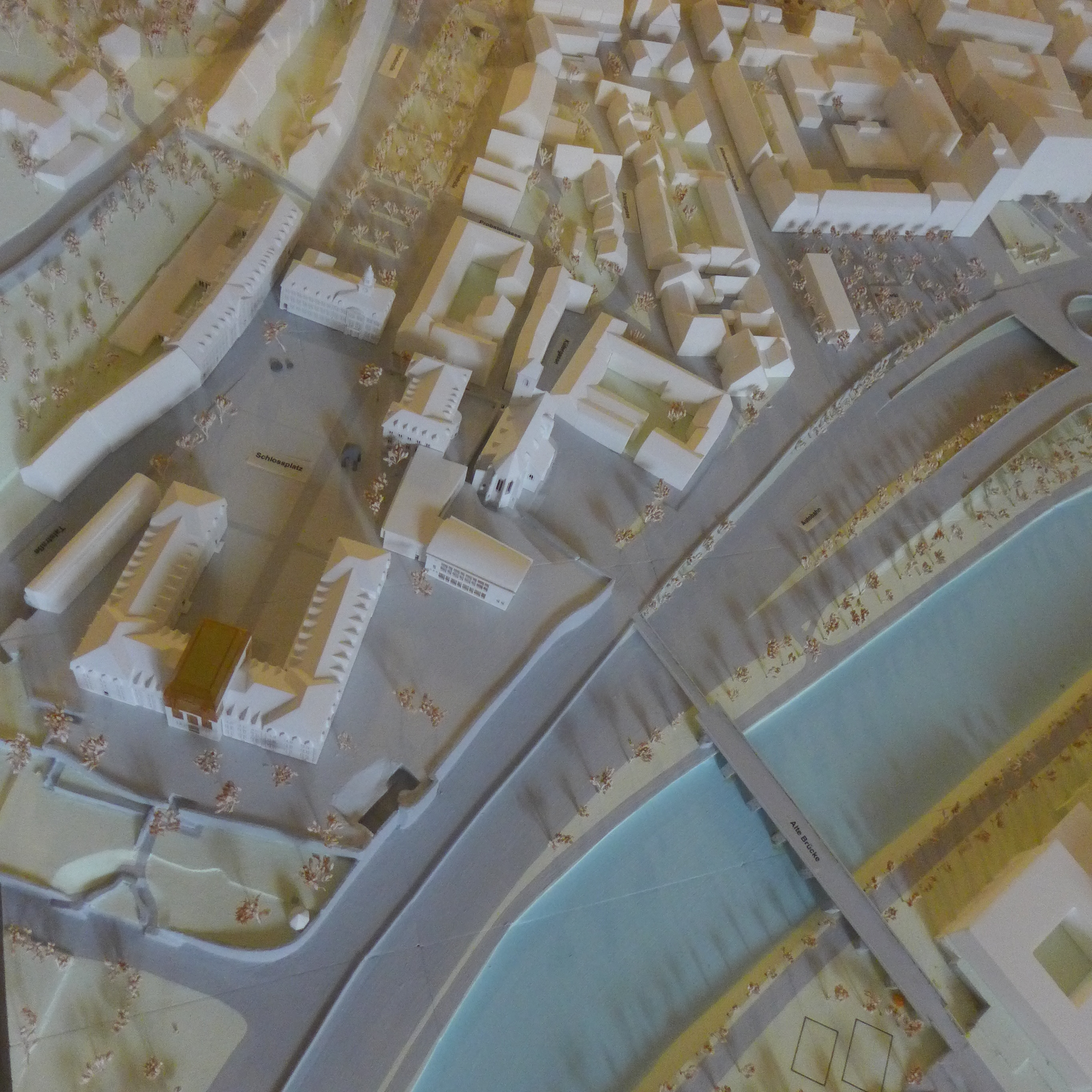 Schloss Saarbrücken, Stadtmodell Saarbrücken (Rathaus St. Johann)